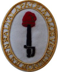 Escudo honorifico de la batalla de Salta otorgado a las tropas victoriosas